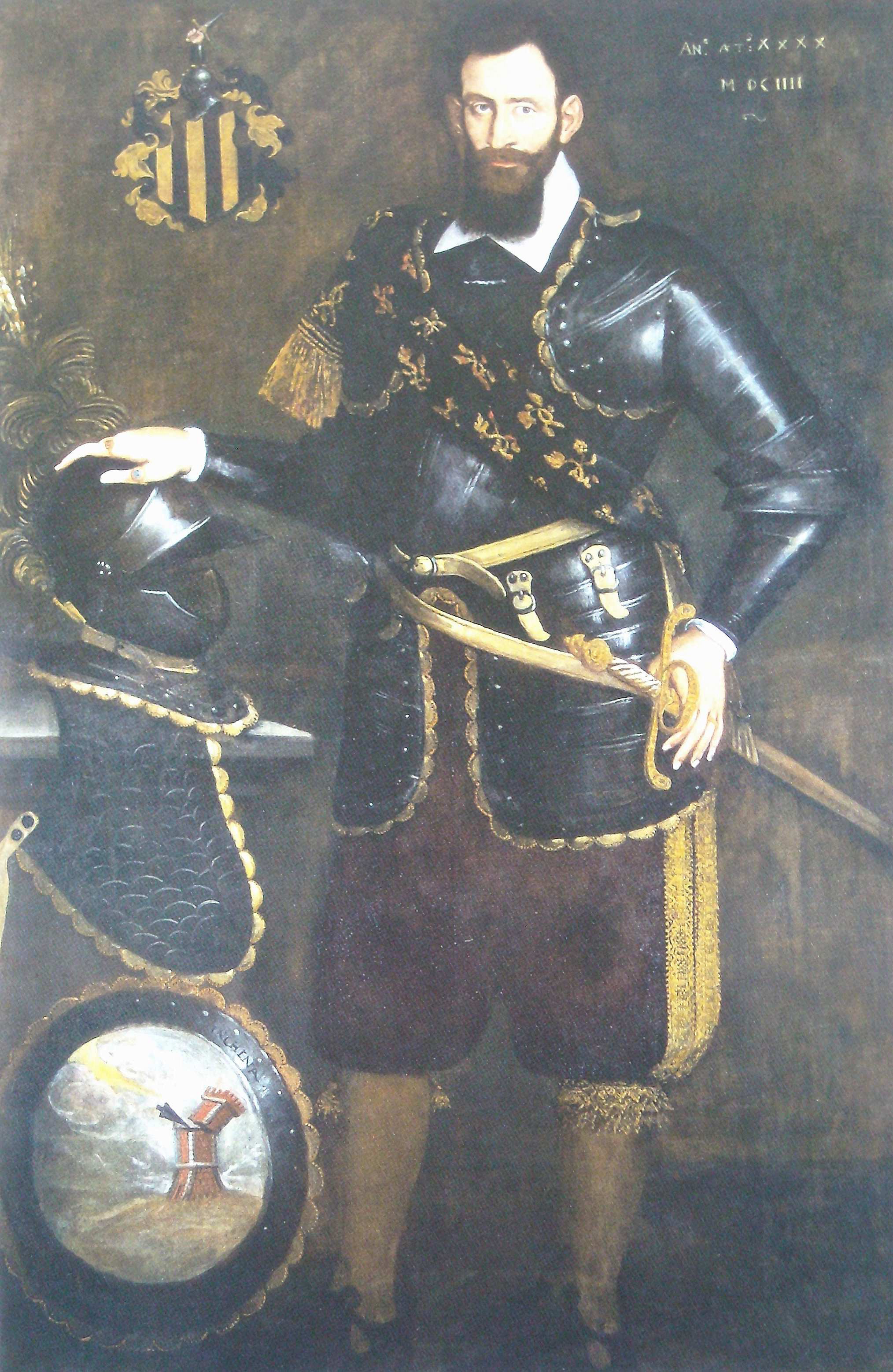 ritratto di Carlo Emanuele Teodoro Trivulzio